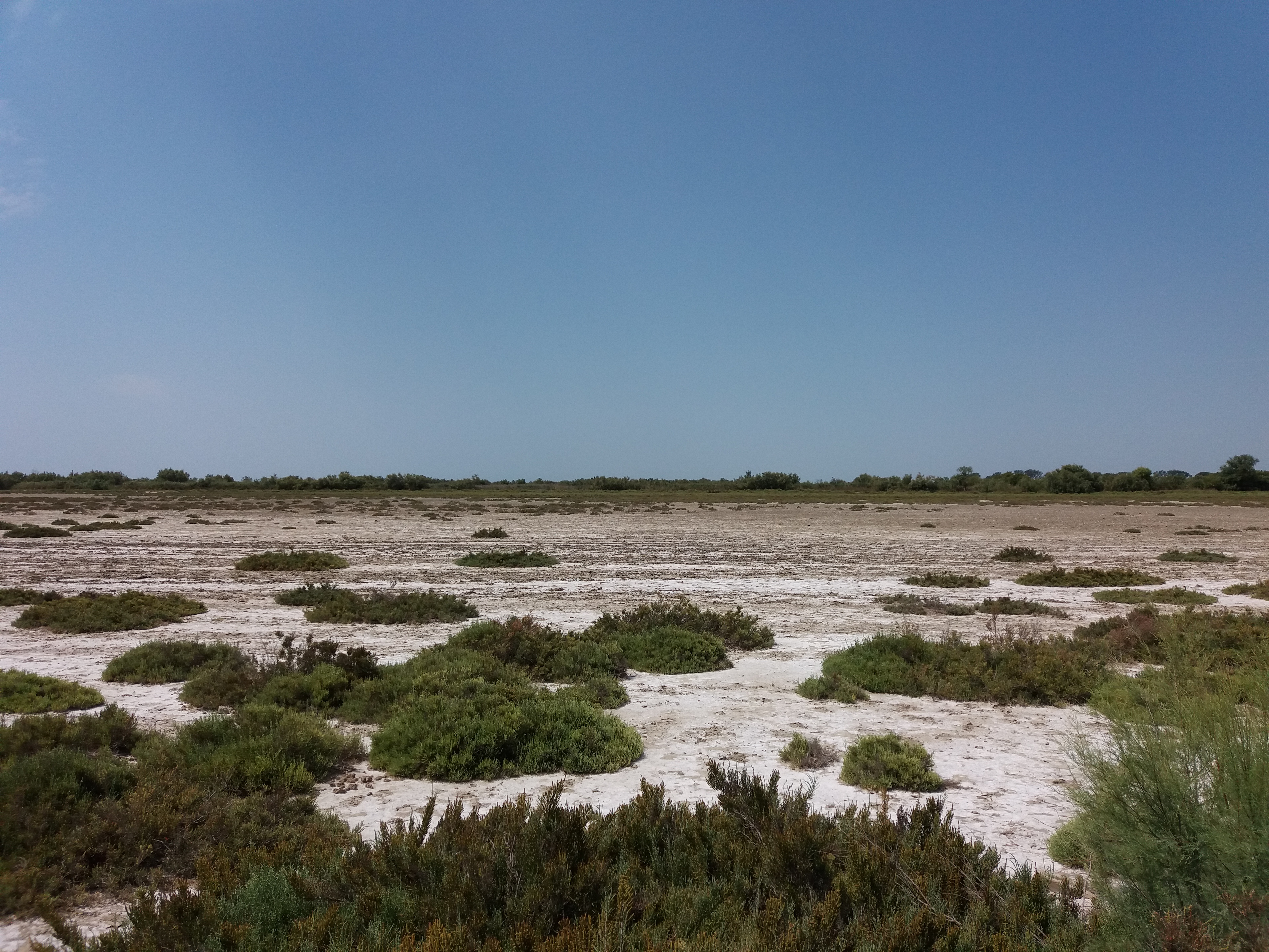 Sentier pédestre : sansouïre.